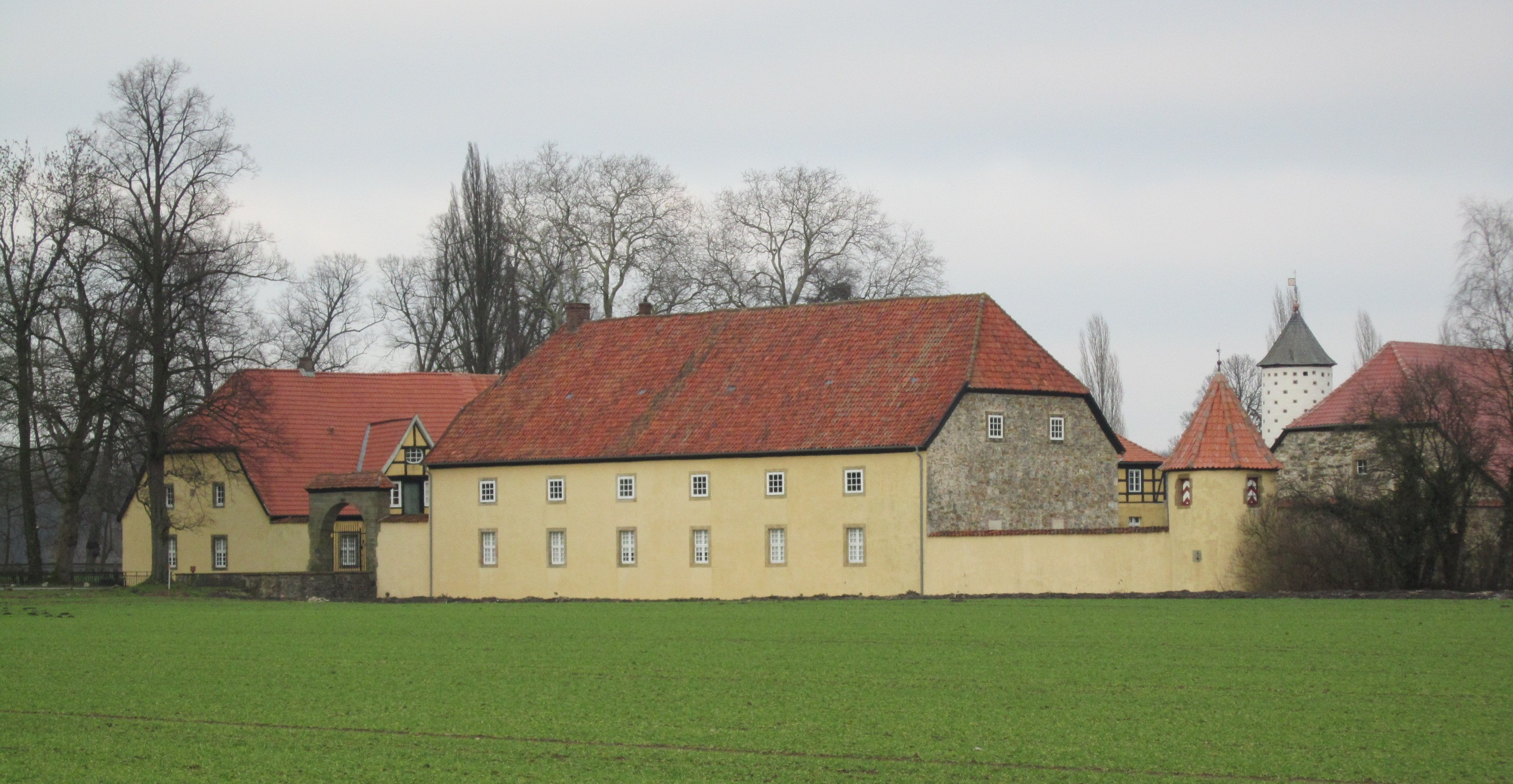 Schloss Hünnefeld (Bad Essen)